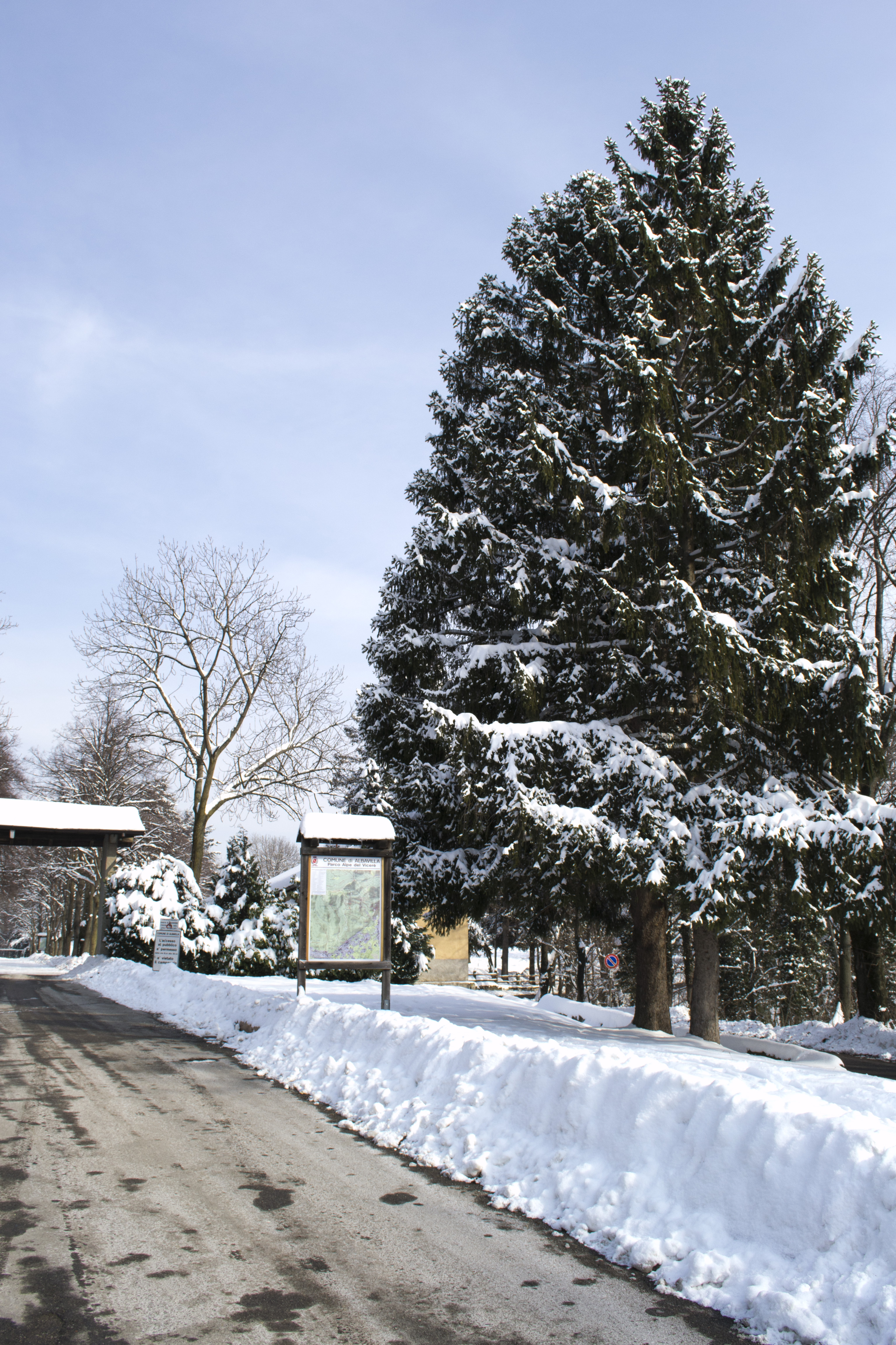 Mark alba